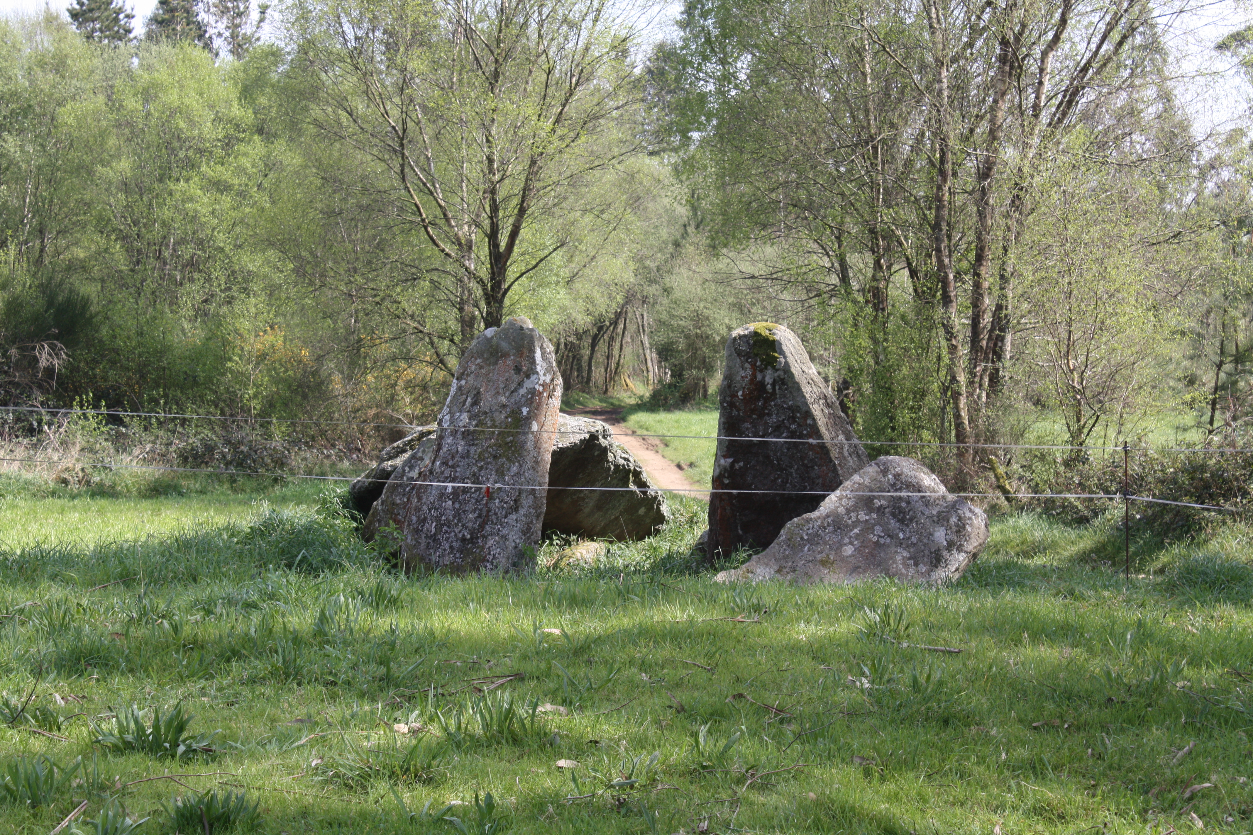 Dolmen da Pedra Moura, en Aldemunde (Carballo, A Coruña)